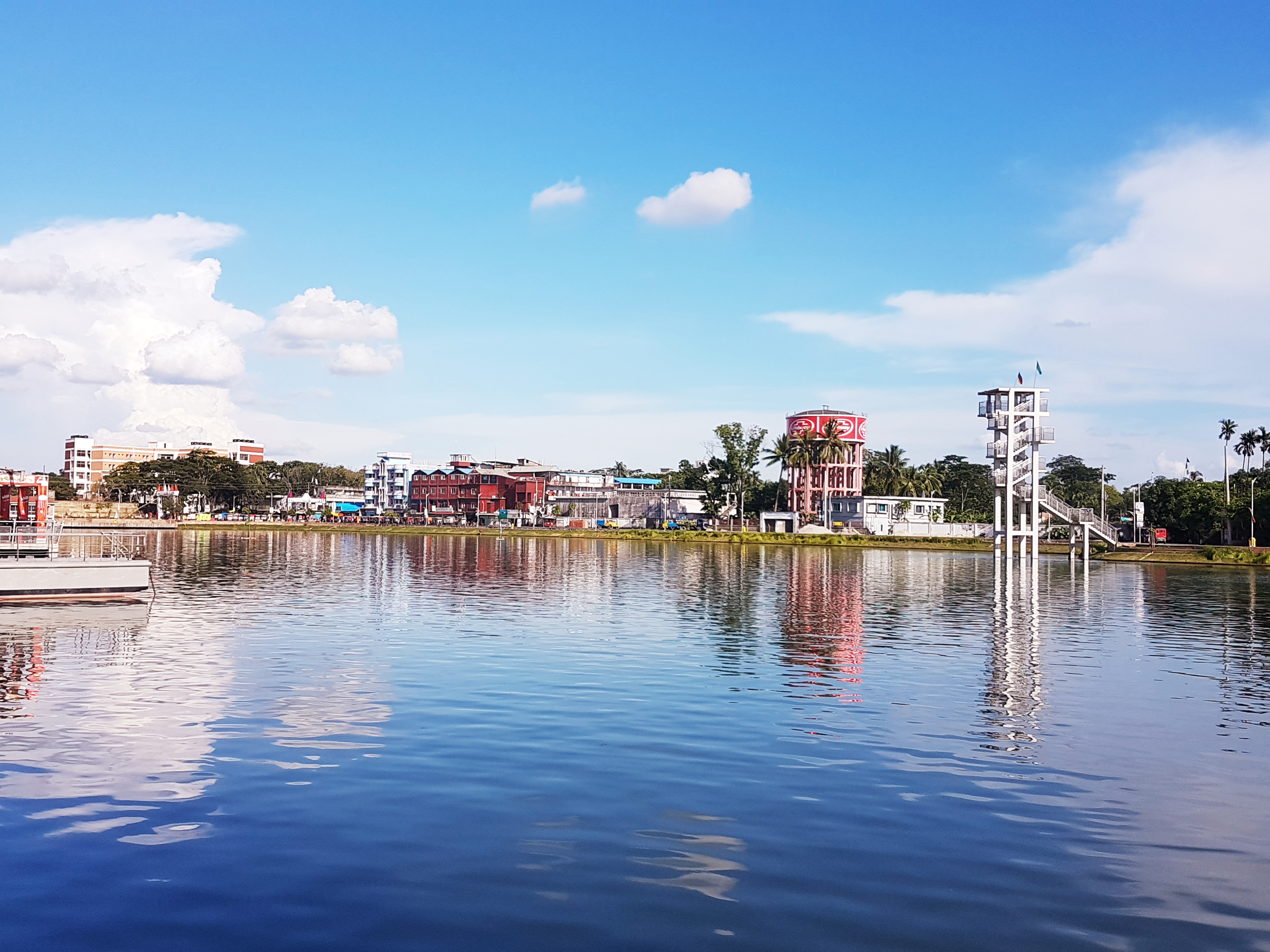 প্রশাসন সূত্রে জানা যায়, ১৮৮৪ সালে শকুনি লেকটি খনন করা হয়। দীর্ঘদিন অযত্ন-অবহেলায় পড়ে ছিল লেকটি। পরে ২০১৩ সালে ২২ কোটি টাকা ব্যয়ে এর সৌন্দর্যবর্ধনের কাজ শুরু হয়। শকুনি লেকটিকে আরও সুন্দর করে তুলতে নেওয়া হয়েছে নতুন কয়েকটি প্রকল্প। এর মধ্যে শকুনি লেকের একটি অংশে শিশুদের বিনোদনের কথা মাথায় রেখে গড়ে তোলা হয়েছে শিশুপার্ক। শহরের কেন্দ্রস্থলে অবস্থিত লেকটির দৈর্ঘ্য প্রায় এক কিলোমিটার।